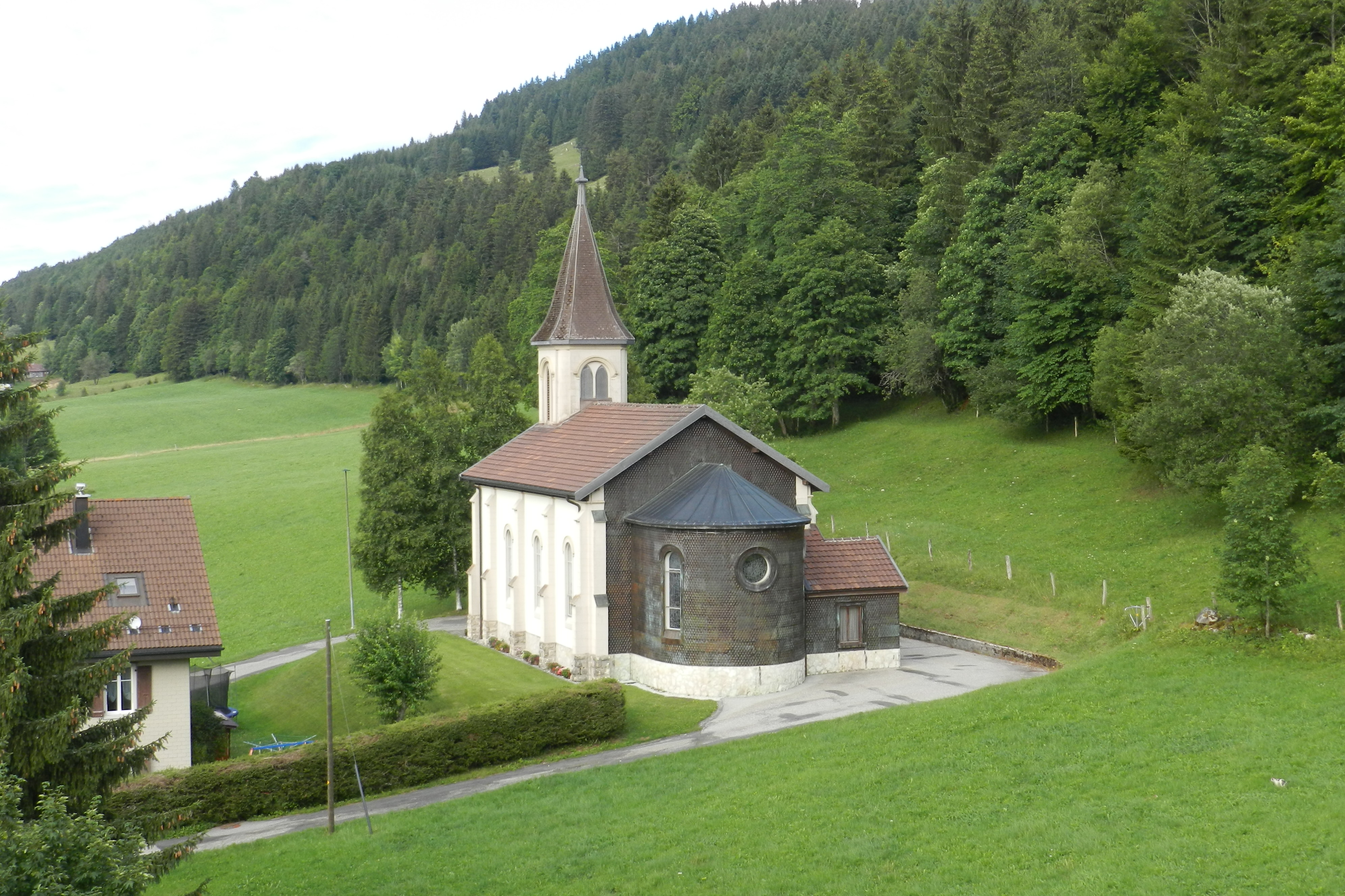 L'église catholique du Brassus, construite à la fin du XIXe siècle.